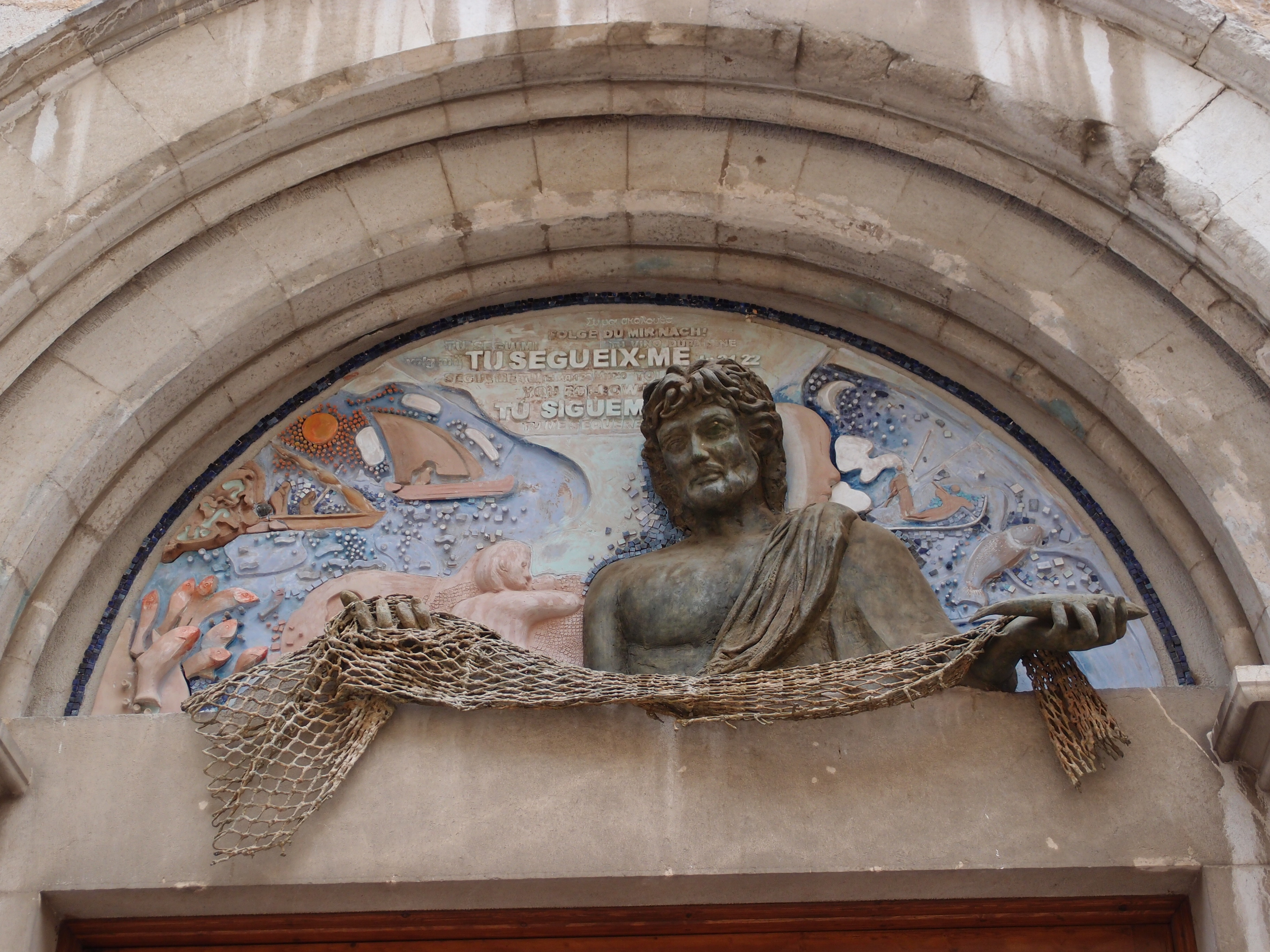 Petrus als Fischer über dem Portal der Kirche Sant Pere in Figueres.